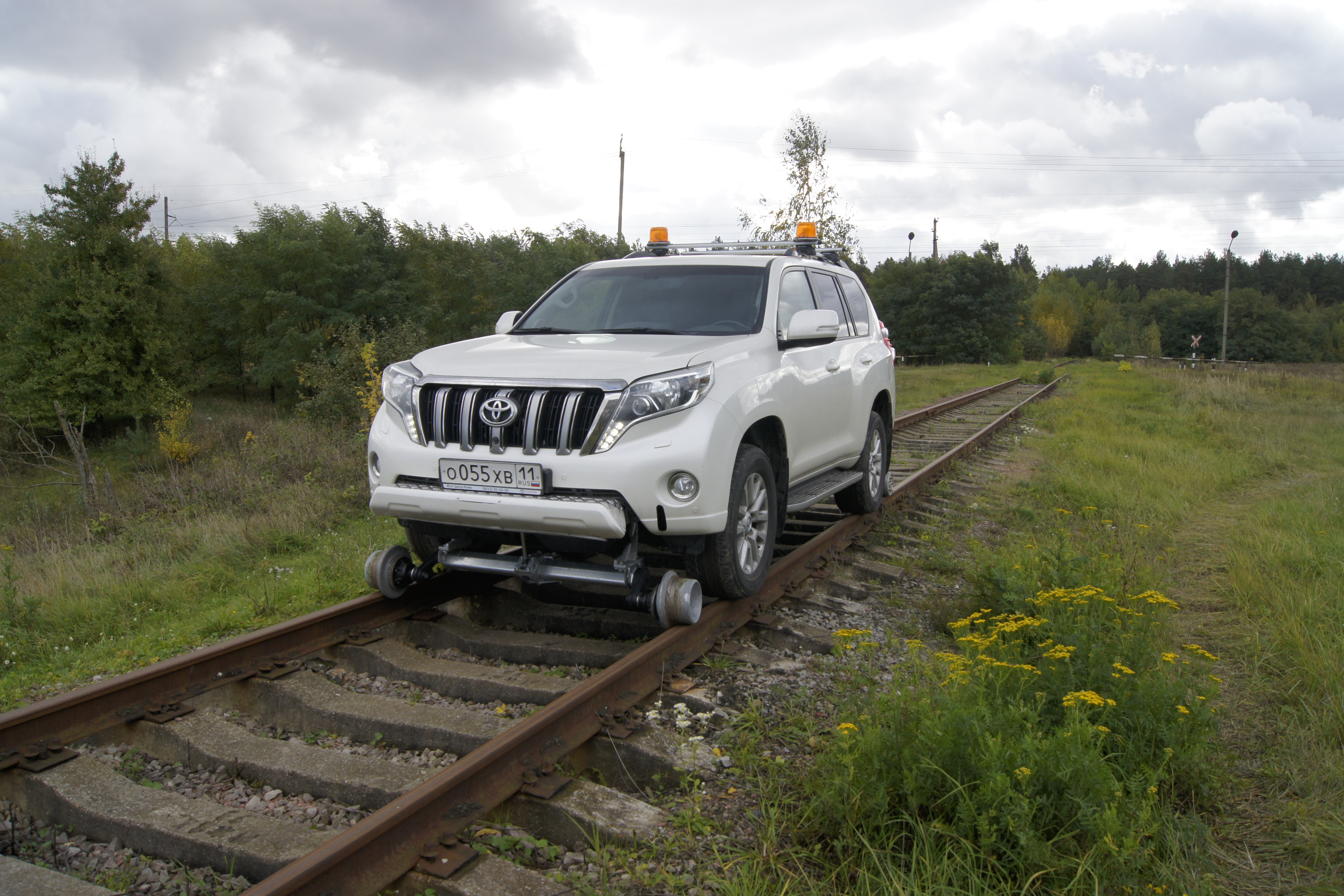 Компания АВТ-Сервис, ОДО (Республика Беларусь, сайт: модернизирует и изготавливает новые дорожно-рельсовые машины (локомобили)